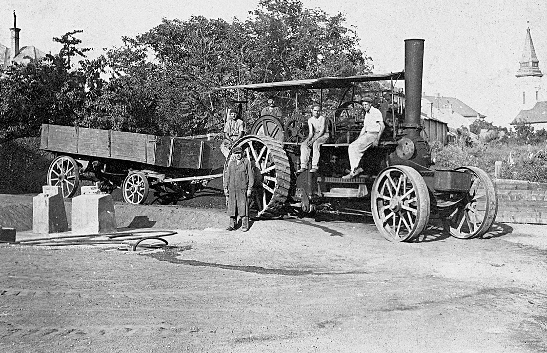 a gőzfürdő működtetéséhez szenet szállító Gőzlokomobil (Hofherr-Schrantz-Clayton-Shuttleworth), háttérben a református templom. Location: Hungary, Dombóvár Tags: Steam-engine, vehicle, transport, H.S.C.S-brand Title: a gőzfürdő működtetéséhez szenet szállító Gőzlokomobil (Hofherr-Schrantz-Clayton-Shuttleworth), háttérben a református templom.